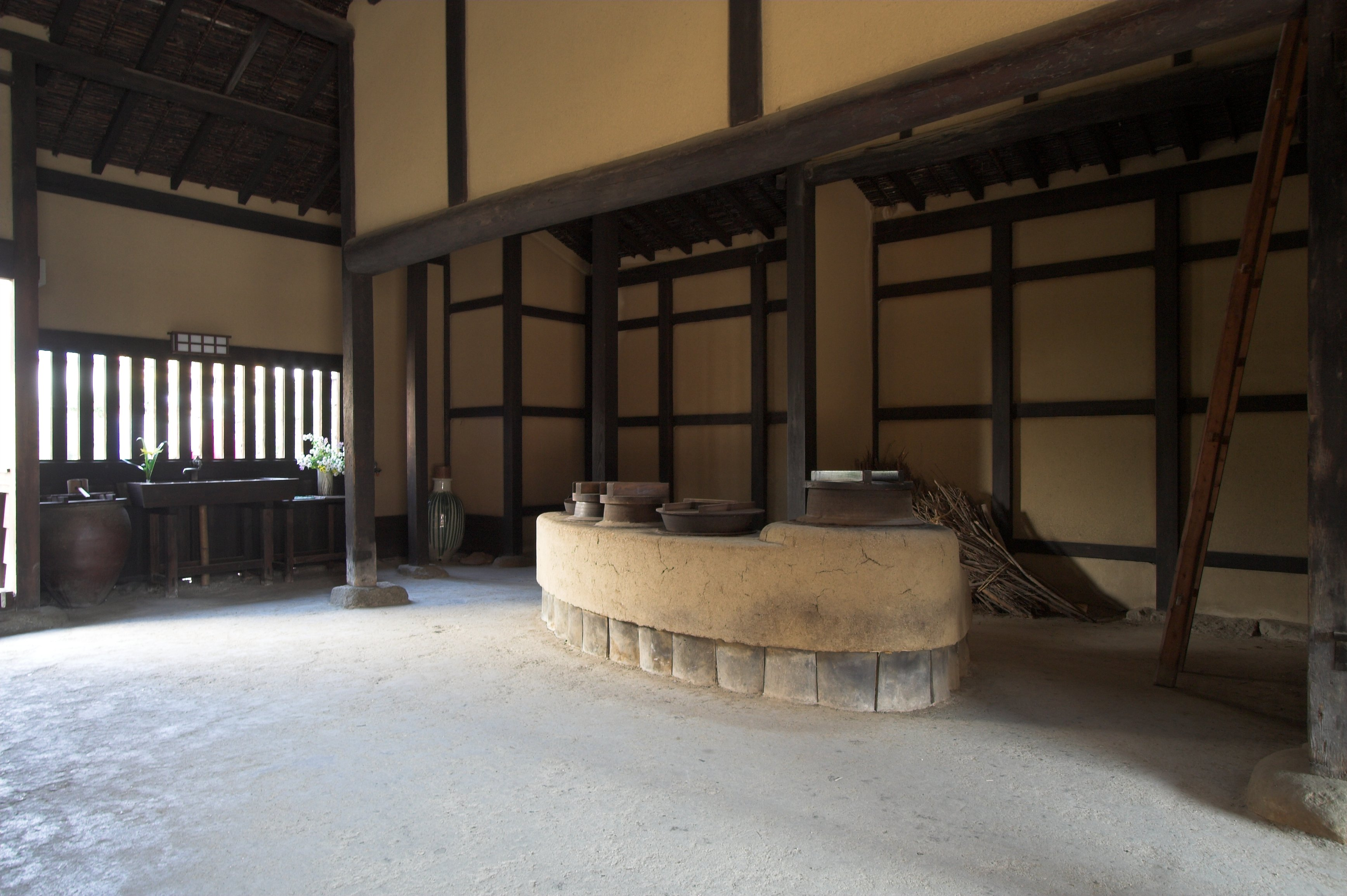 旧米谷家住宅(奈良県橿原市, Japan)